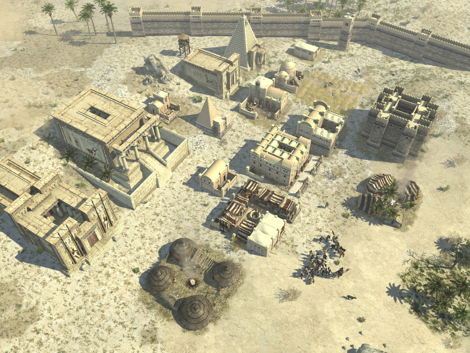 0 A.D. Kushiten